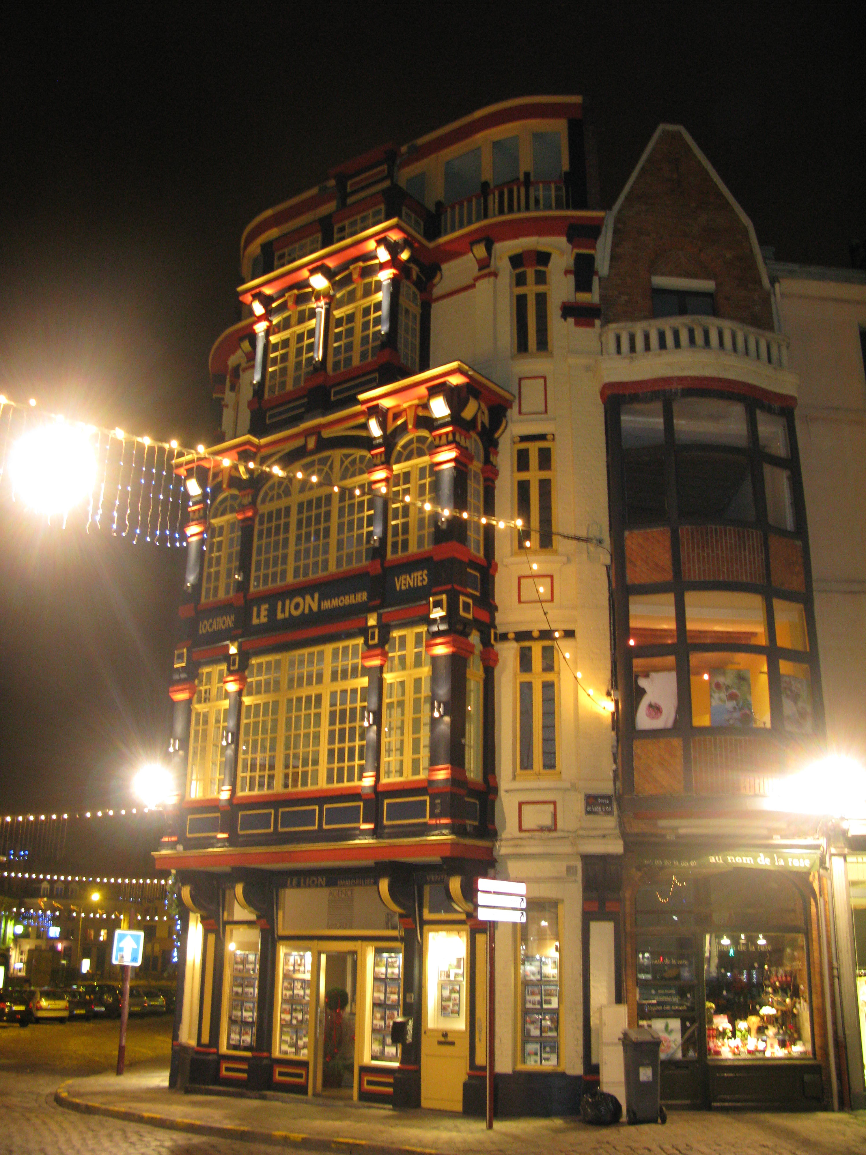 Place du Lion d'Or, Lille